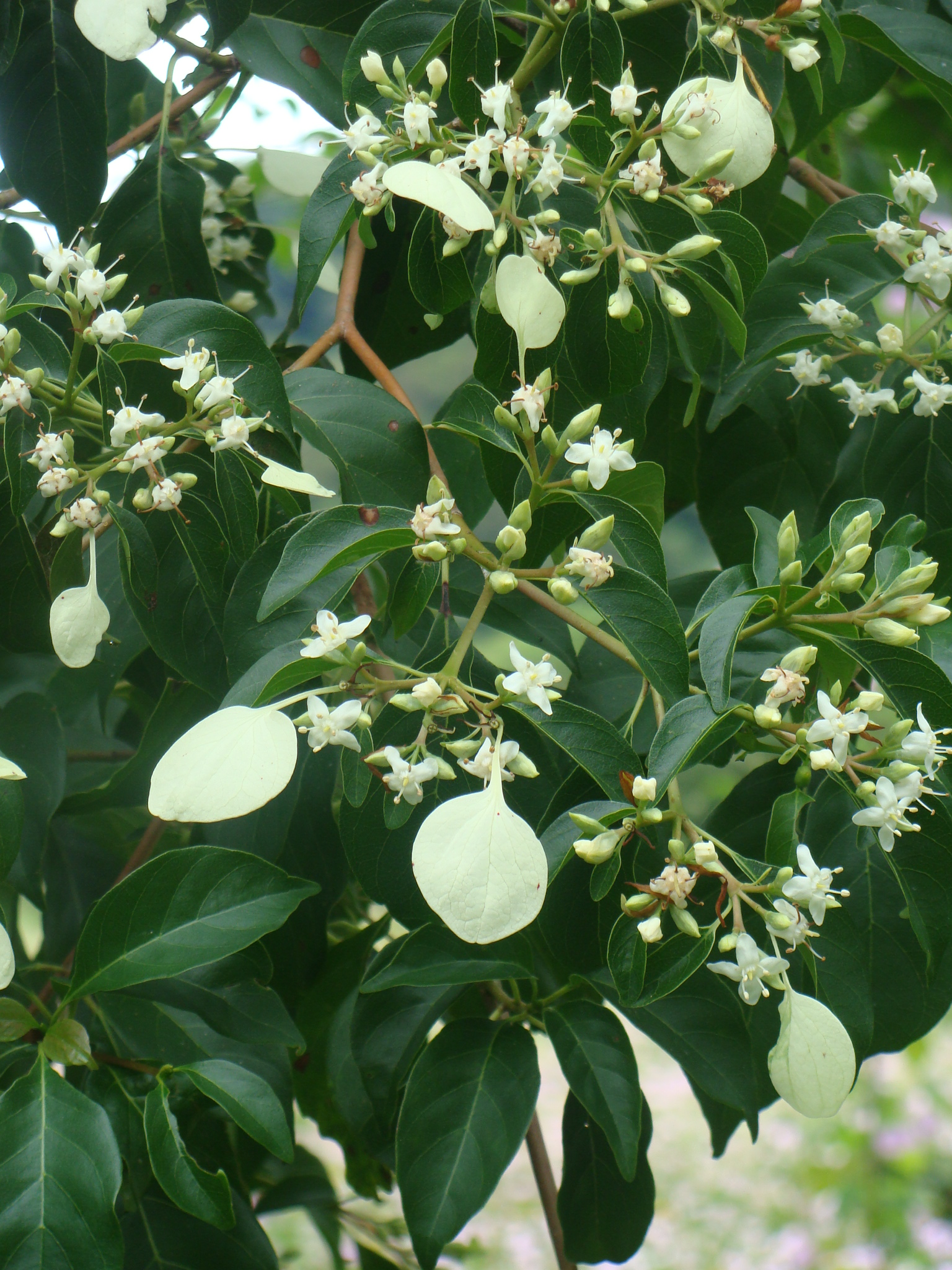 Planta de las selvas de Chiapas, se le llama regionalmente Canelo